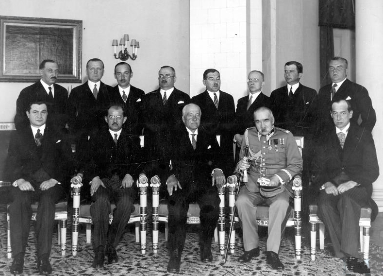 Polish Government under Prime Minister Leon Kozłowski 1934